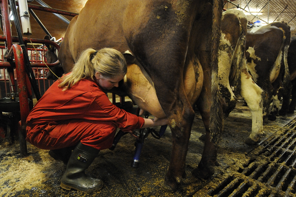 Milking machine and cow at Mære landbruksskole, Steinkjer, Norway